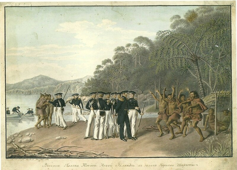 Михайлов Павел Николаевич - Военные пляски Южной Новой Зеландии